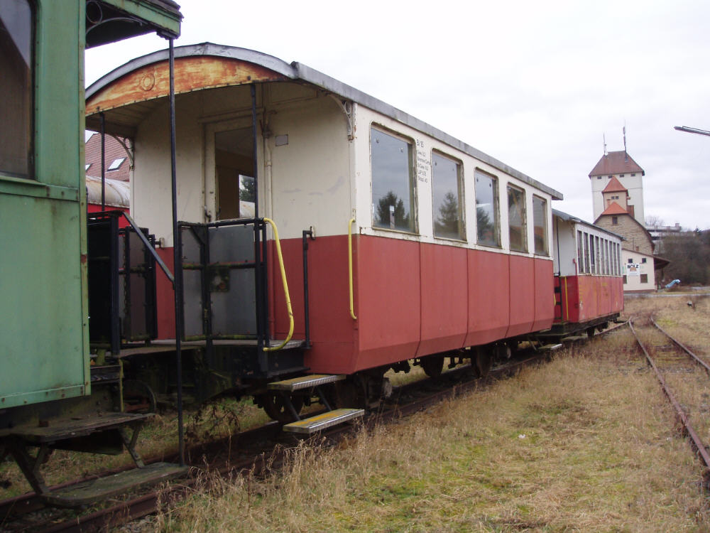 Wagen Bi 15 der Jagsttalbahn, 1920 in Schlieren von SWS gebaut, Kaufpreis 34.465 SFr. Bis 1955 als C 37 bei der Elektrische Strassenbahnen im Kanton Zug (ESZ), bis 1969 als B 15 bei der Sernftalbahn (SeTB), weiterverkauft an Eurovapor, von dort 1981 an die Jagsttalbahn weitervermittelt. Von 1984 bis zum Ende des Museumsbahnbetriebes der Jagsttalbahn genutzt, jetzt abgestellt (Bieringen (Jagst)).